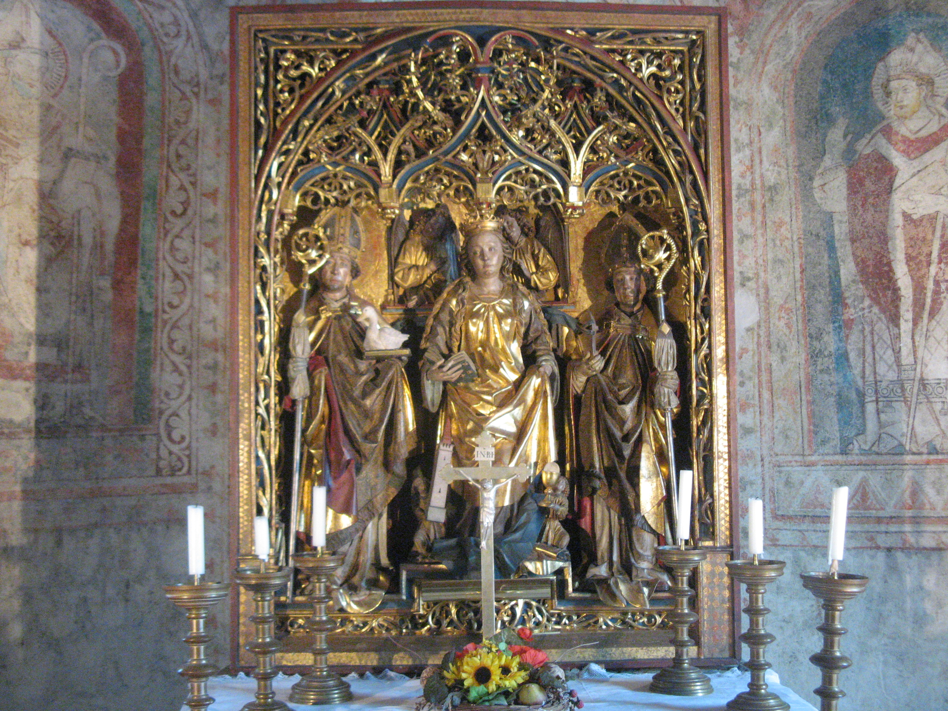 Barbaraaltar (um 1490) von Hans Klocker, Schlosskapelle, Schloss Tirol